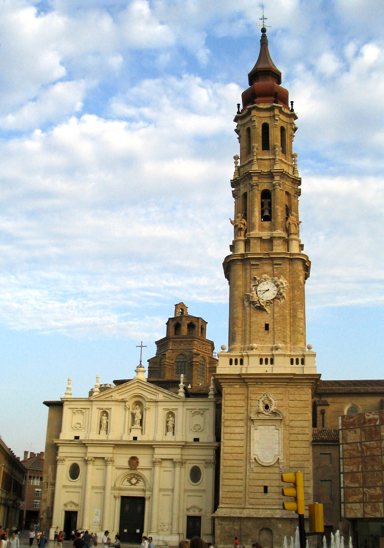 La Seo del Salvador (Zaragoza, España)